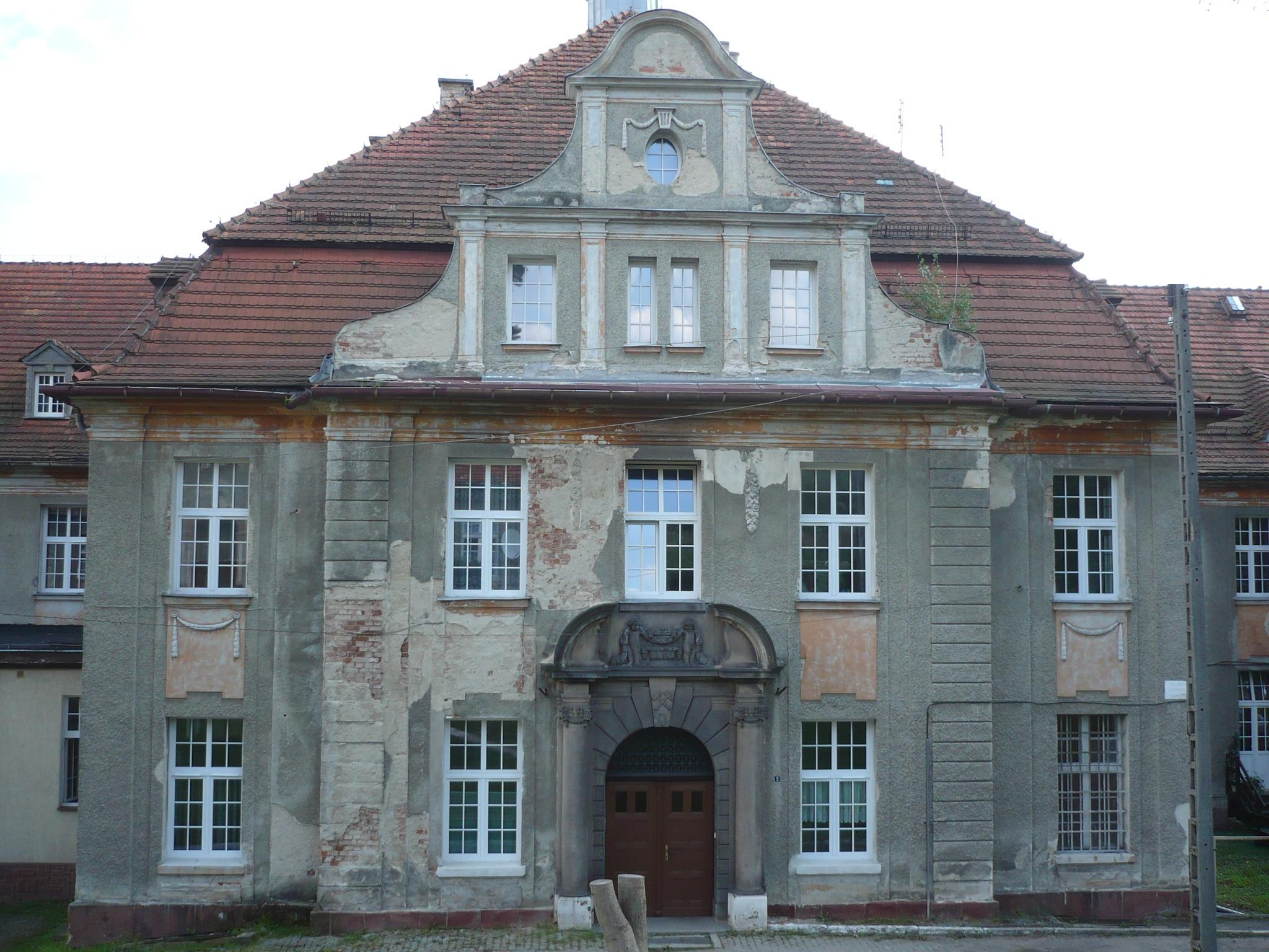 Nowa Ruda, ul. Szpitalna 2 - Szpital bracki (górniczy), 1911